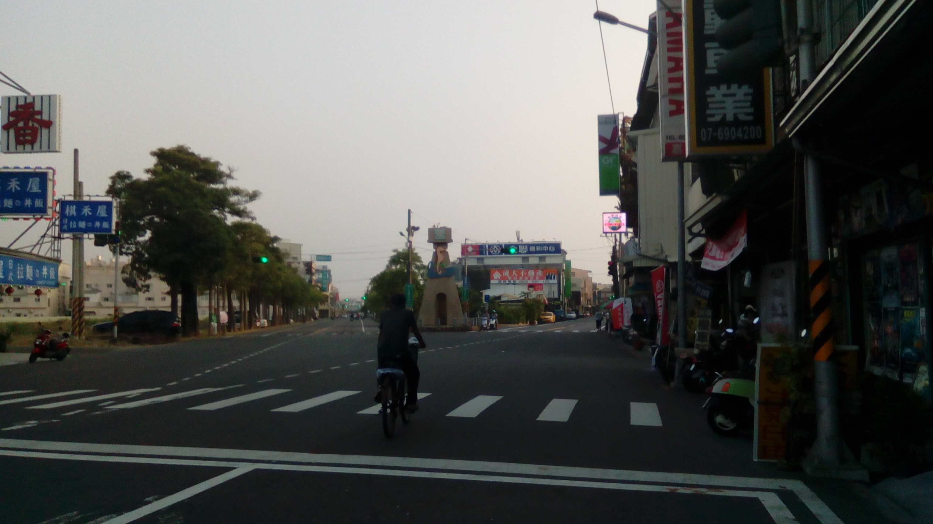 忠孝街及茄萣路二段叉路口